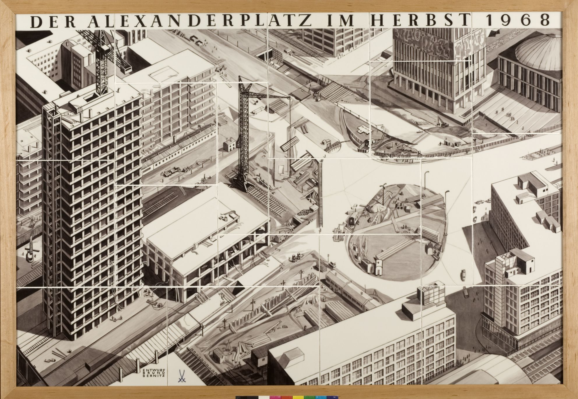 Fliesenbild Alexanderplatz